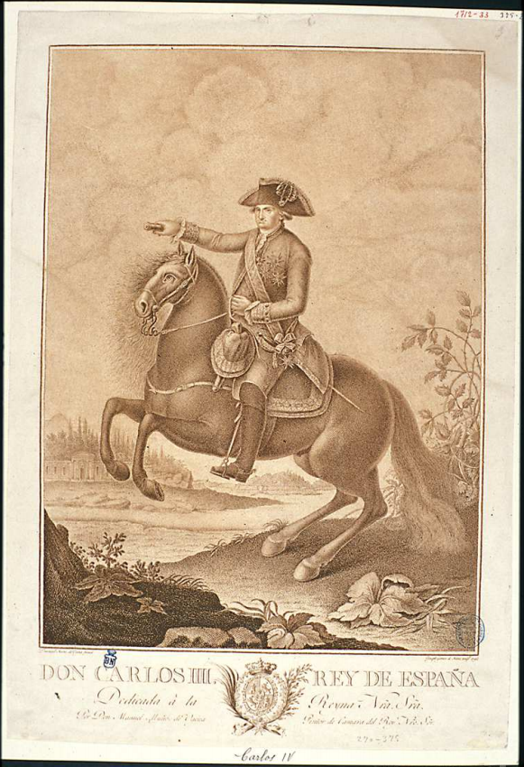 Carlos IV, estampe de José Gómez de Navia.